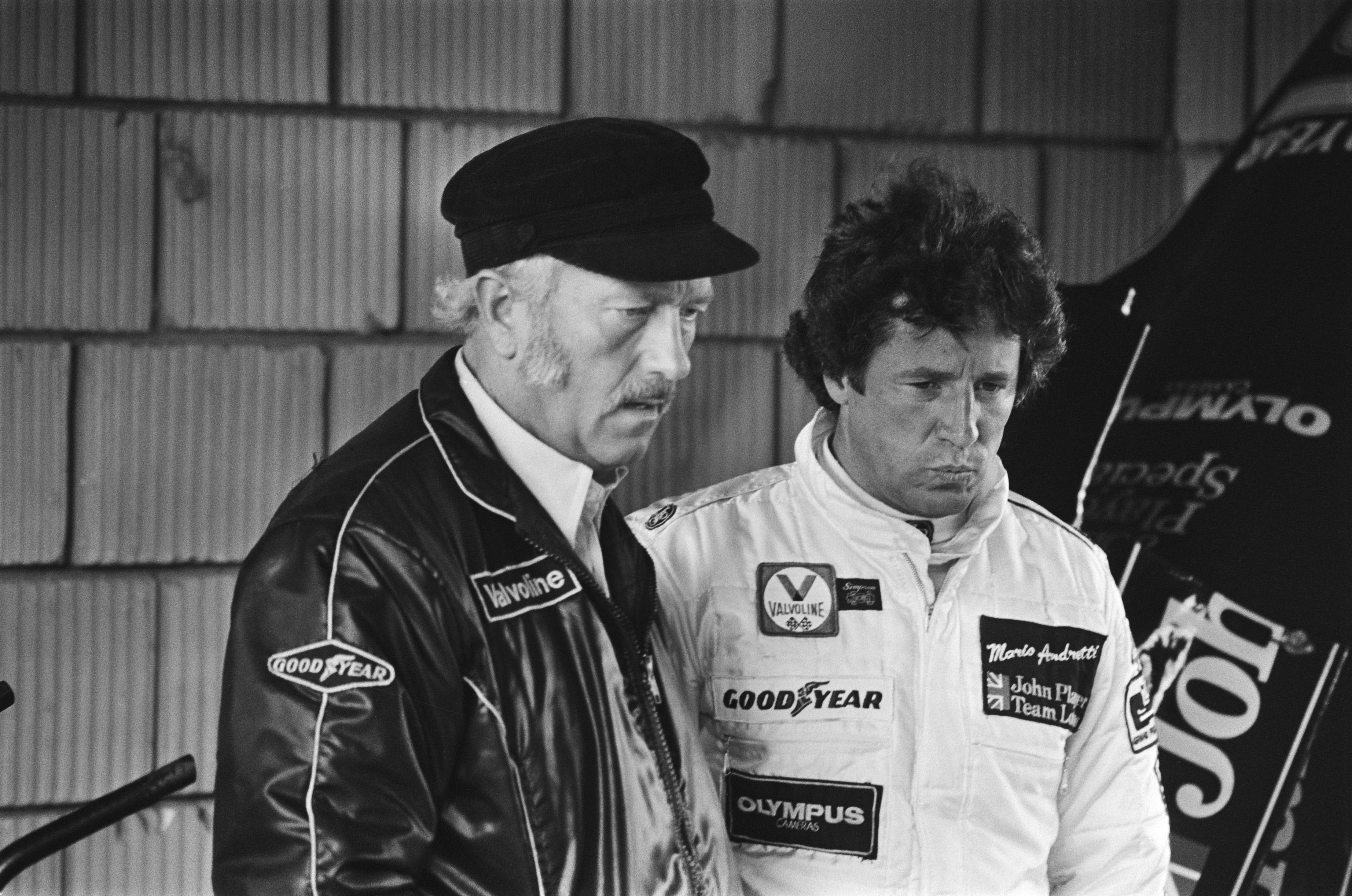 Training Grand Prix Zandvoort; lotusteam-manager Colin Chapmann (l) en Mario Andretti.